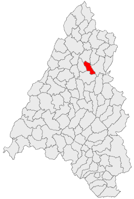 Categorie:Hărţi ale judeţului Bihor